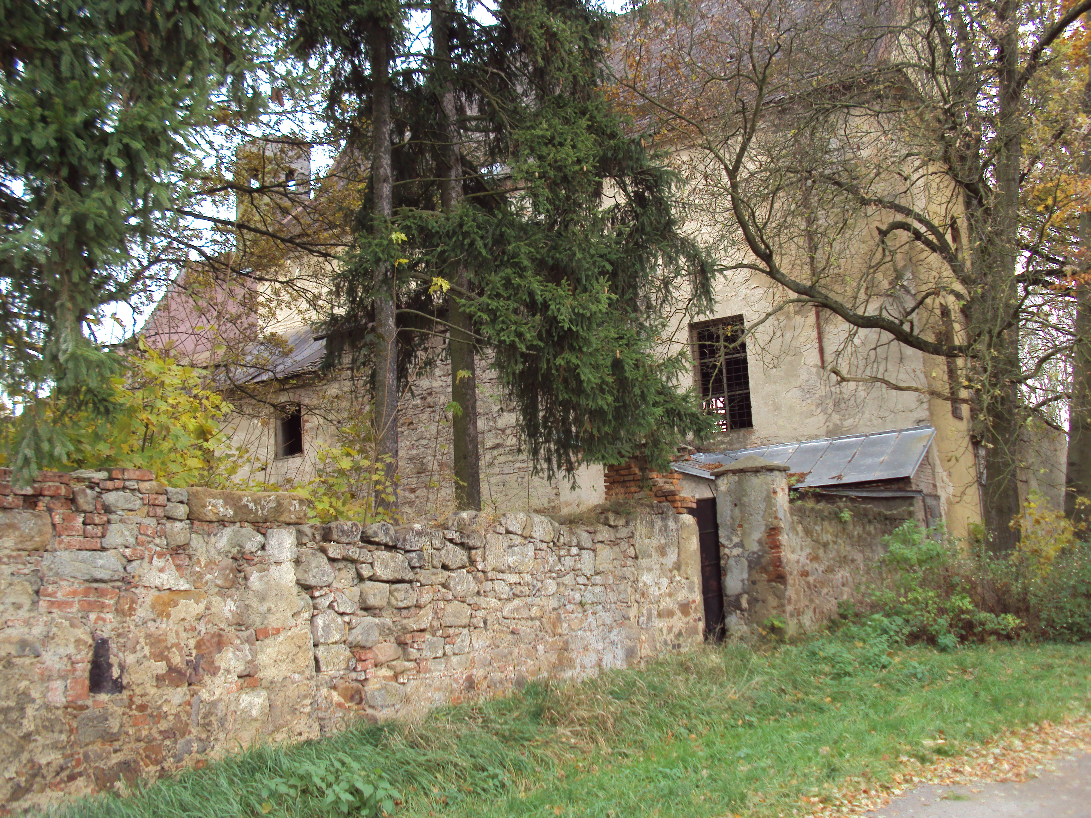 Kostel v areálu kláštera kapucínů v Zákupech, zleva